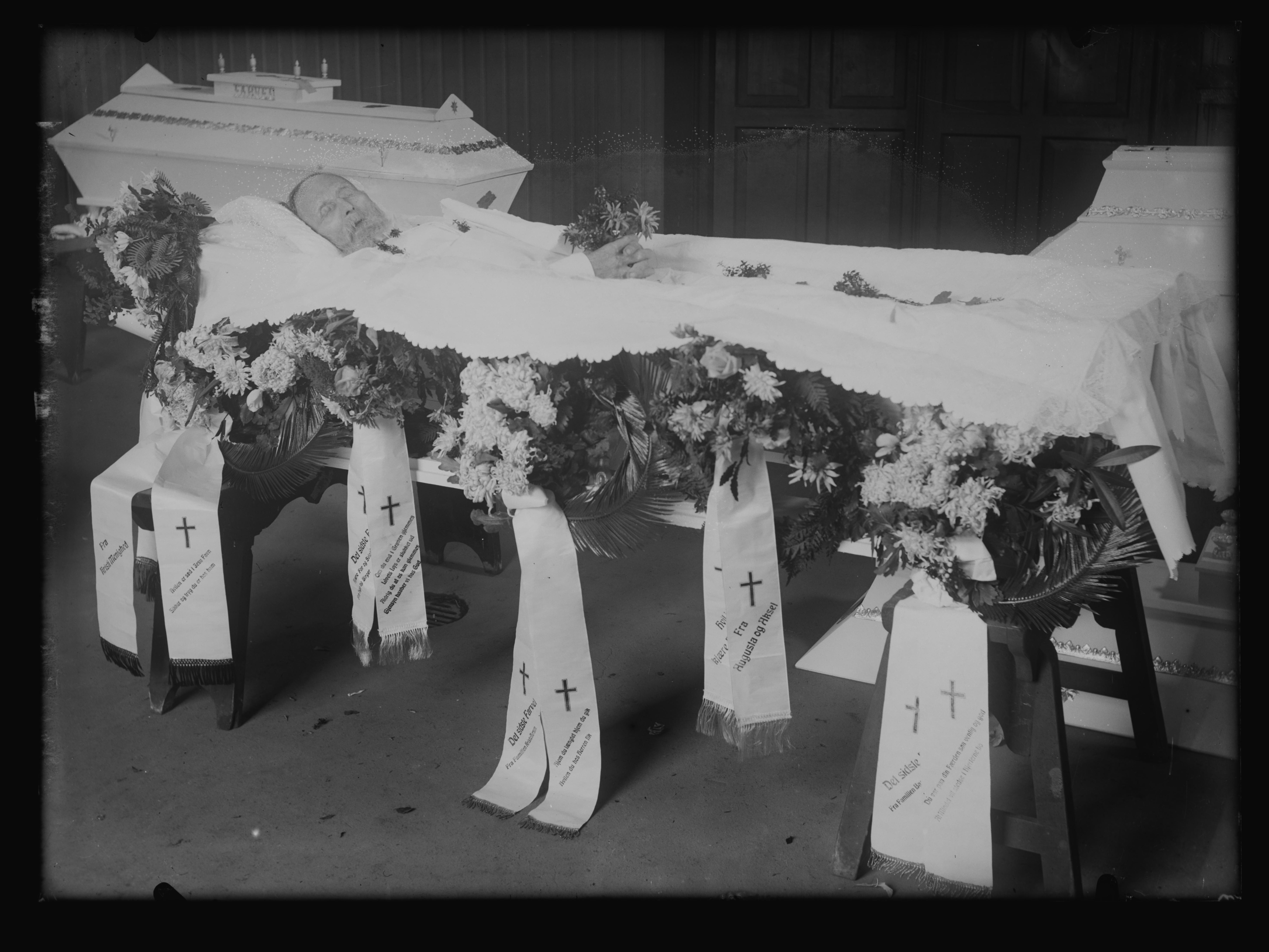 Bildet er hentet fra Nasjonalbibliotekets bildesamling. Anmerkninger til bildet var: Påskrift arkivark: Andersen lik Arkivnummer: 236